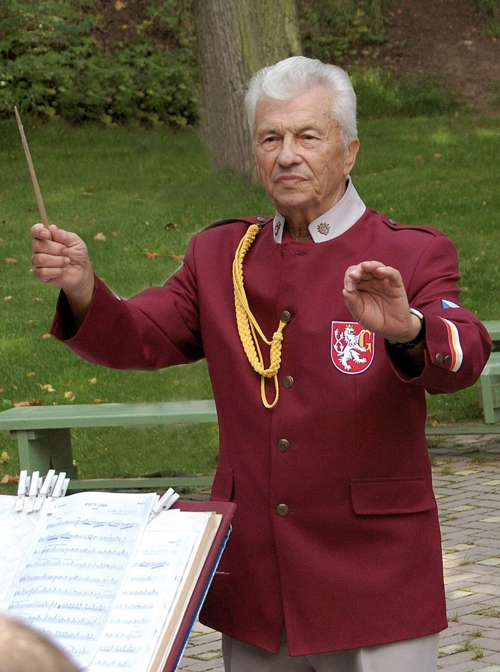 Josef Maršík diriguje Dechový orchestr města Hradce Králové na promenádním koncertě v Předměřicích nad Labem